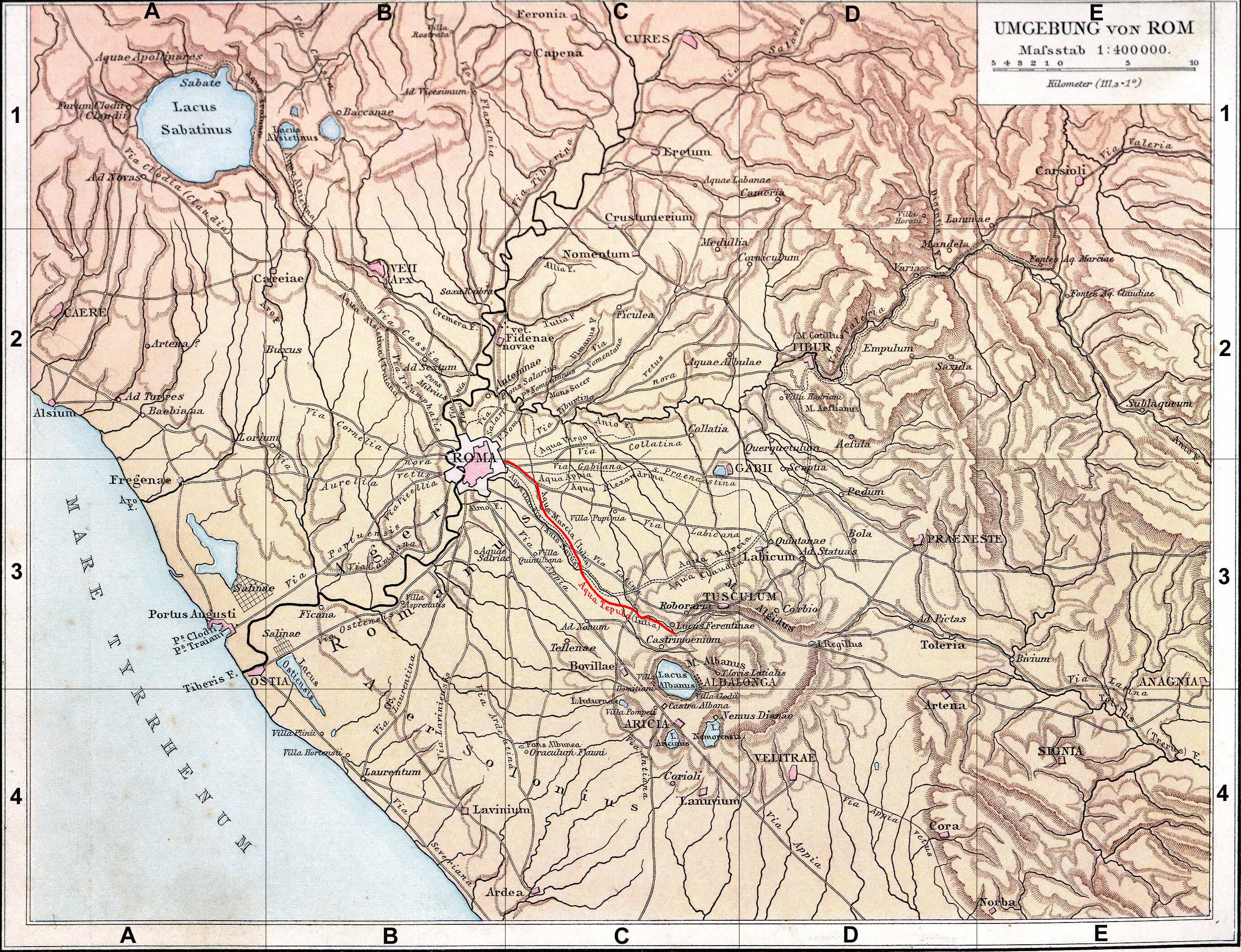 Fond de carte de 1886 (G. Droysens Allgemeiner Historischer Handatlas), libre de droit (Image:Rom_Umgebung.jpg), avec l'aqua Tepula en rouge.